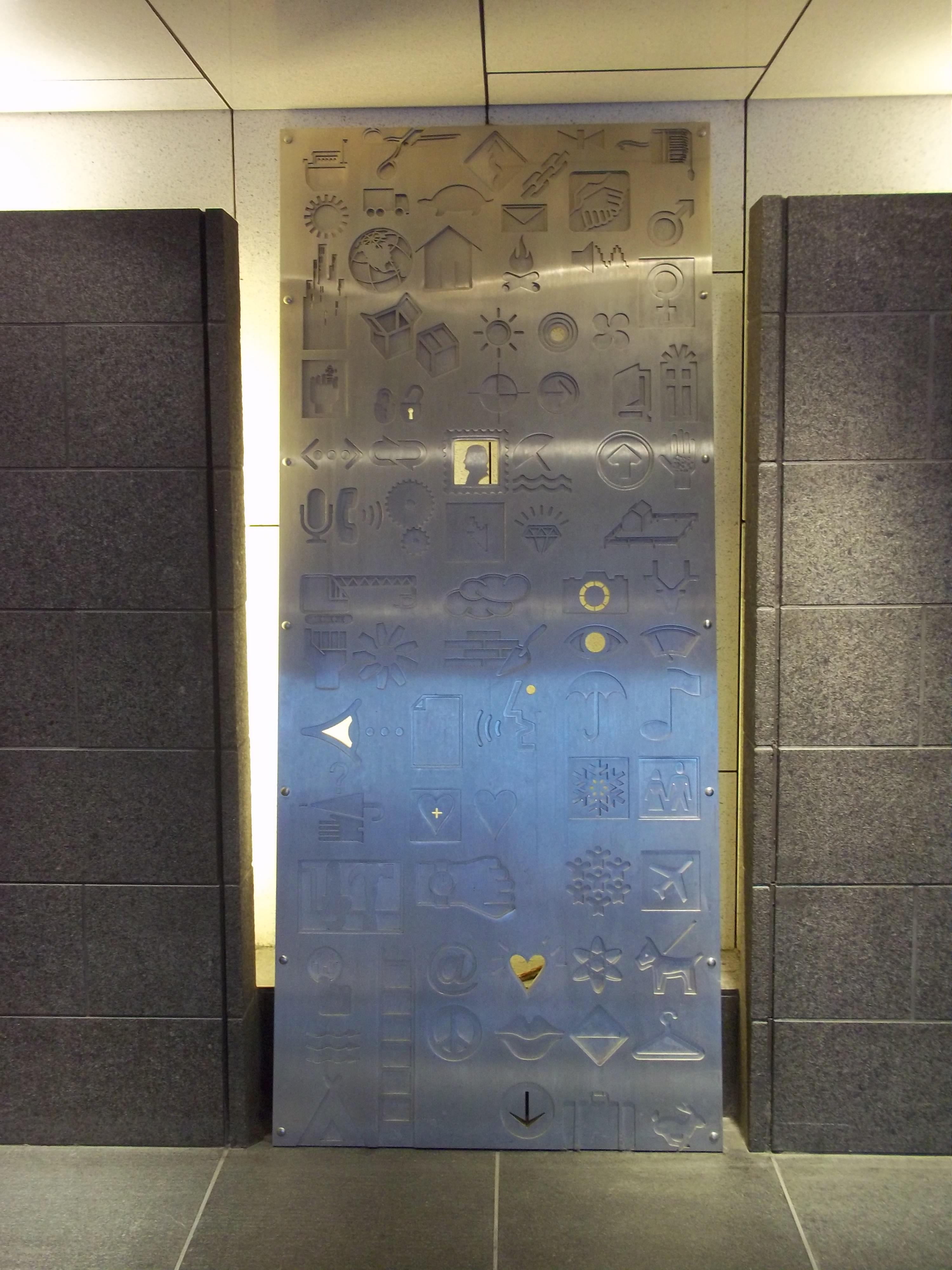 Sculpture de Michel Goulet intitulée Tables, de 2005. Elle est située dans le Montréal souterrain, dans le périmètre du Quartier international de Montréal, à l'entrée de la place Jean-Paul-Riopelle. « J'ai toujours privilégié dans mon travail l'usage d'objets issus du quotidien, des outils, du mobilier domestique mais aussi des signes qui, par convention sociale, sont des précis d'idées et de concepts. Je tiens pour acquis qu'une chaise ou la lettre « A », tout en étant réels, n'ont plus temporairement d'efficacité ou de valeur en soi, mais en tant que signes de quelque chose d'autre. La fonction symbolique de l'art est mieux servie par des associations d'images (ou d'objets) qui animent l'esprit que par celles qui illustrent ou racontent. »